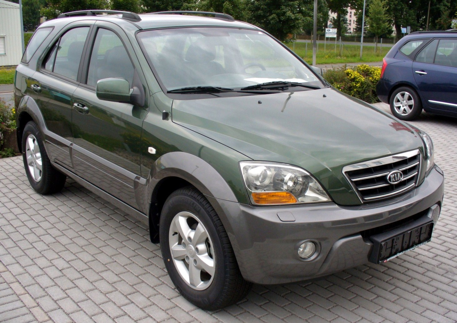 Kia Sorento